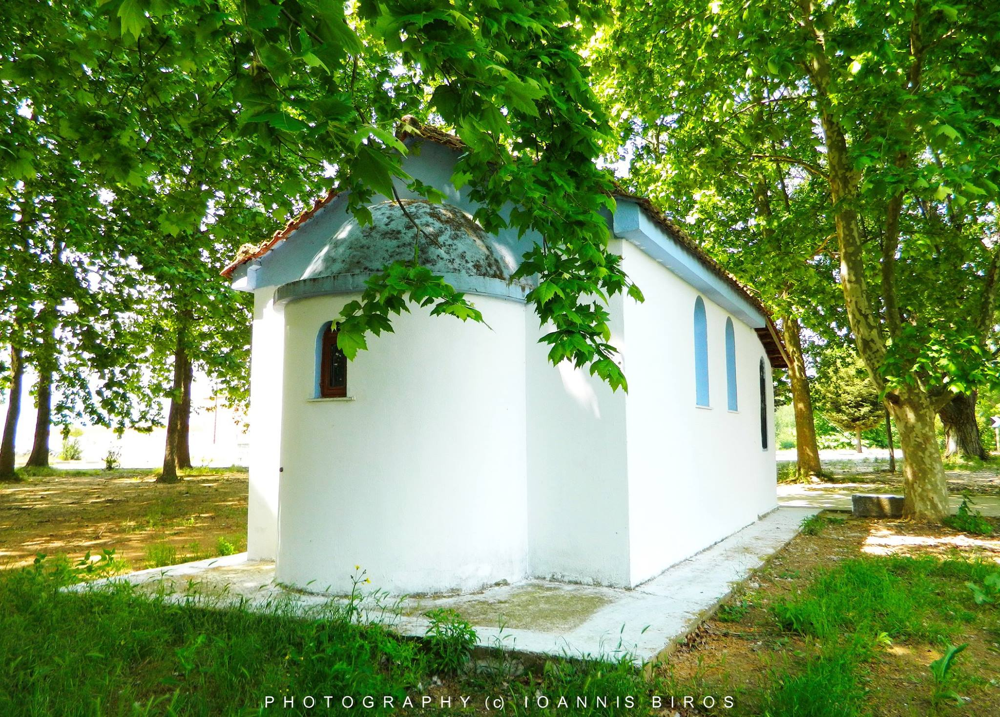 Το Εκκλησάκι του Προφήτη Ηλία στο Καλαμπάκι